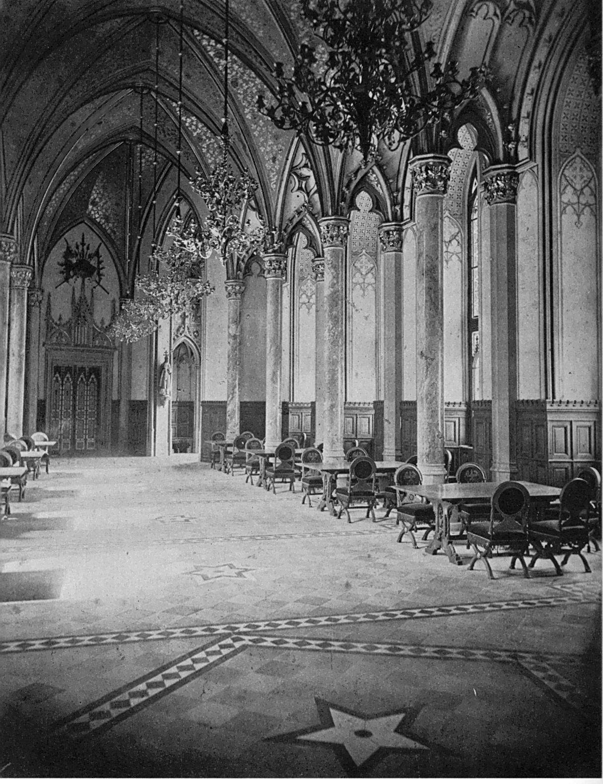 Burg Hohenzollern, Grafensaal, Sinner Archiv Nr. 10/5.5, 245*189 mm